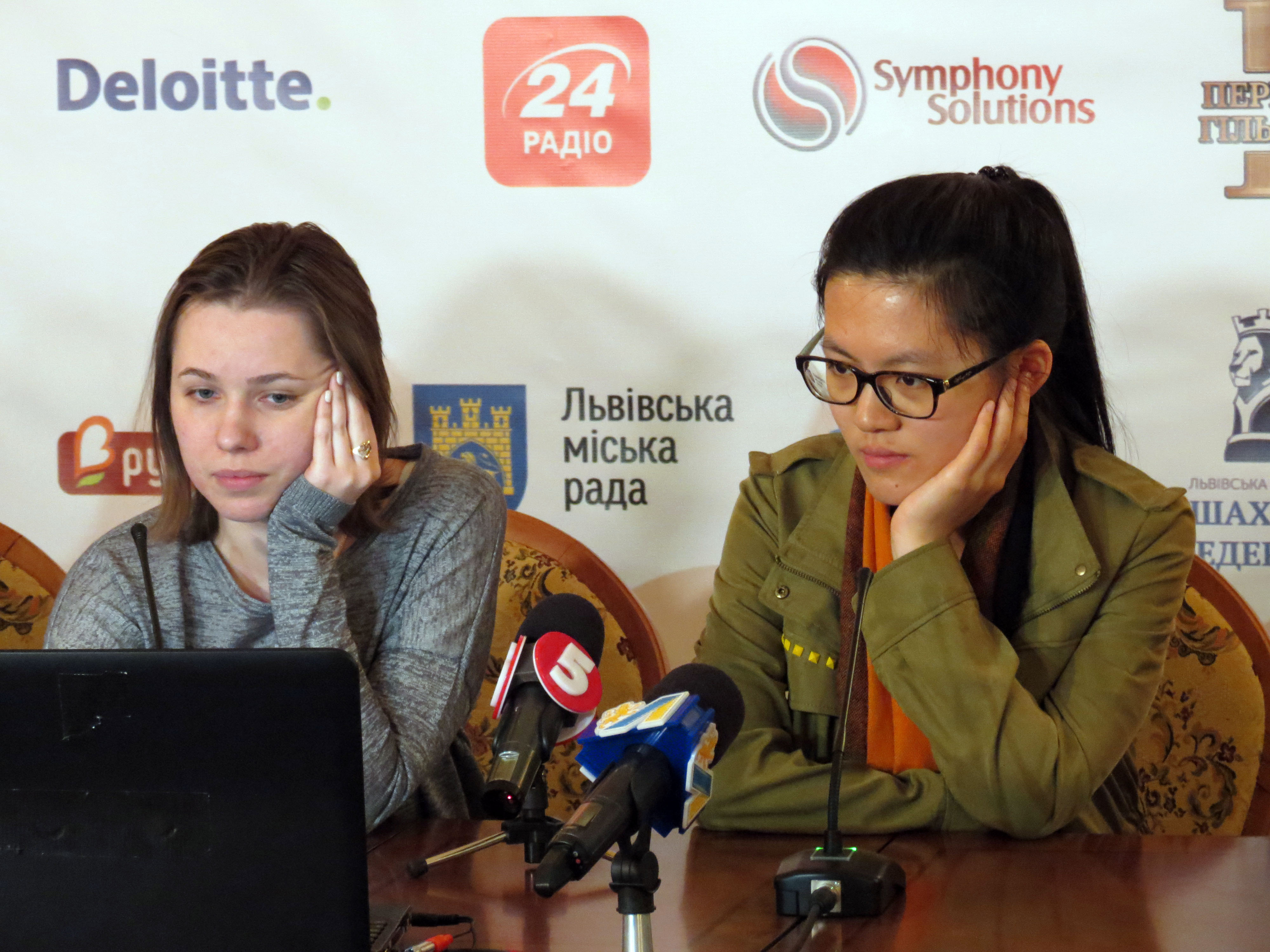 Марія Музичук та Хоу Іфань, матч за звання чемпіонки світу з шахів серед жінок 2016 (прес-конференція 12-03-2016)